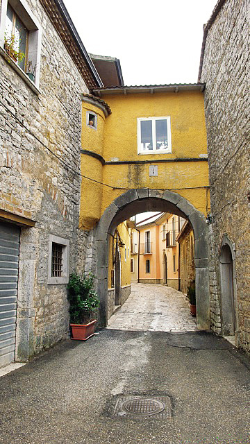 Porta di Rose, San Marco dei Cavoti (BN), Italia